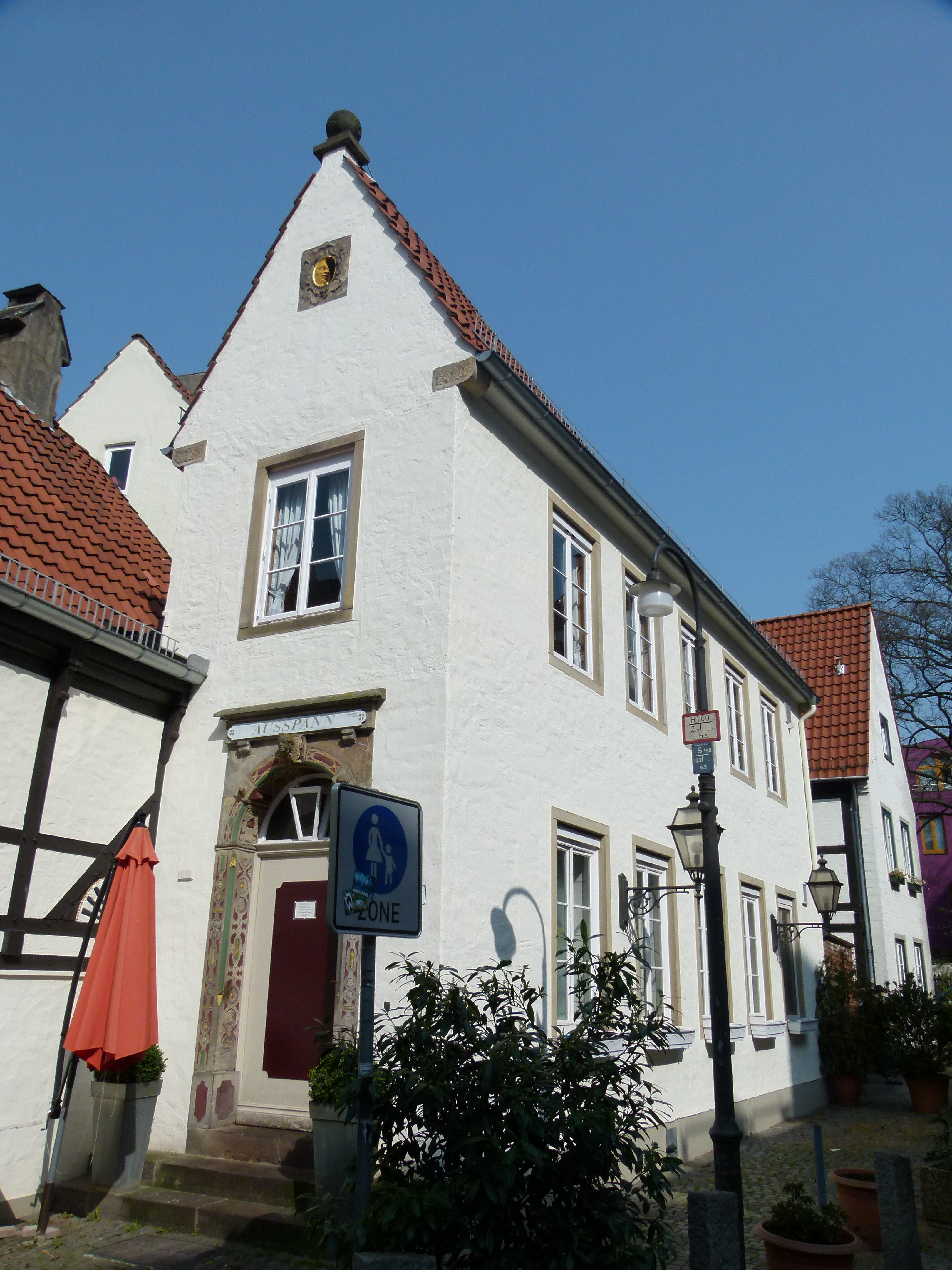 Schnoor-Viertel in Bremen